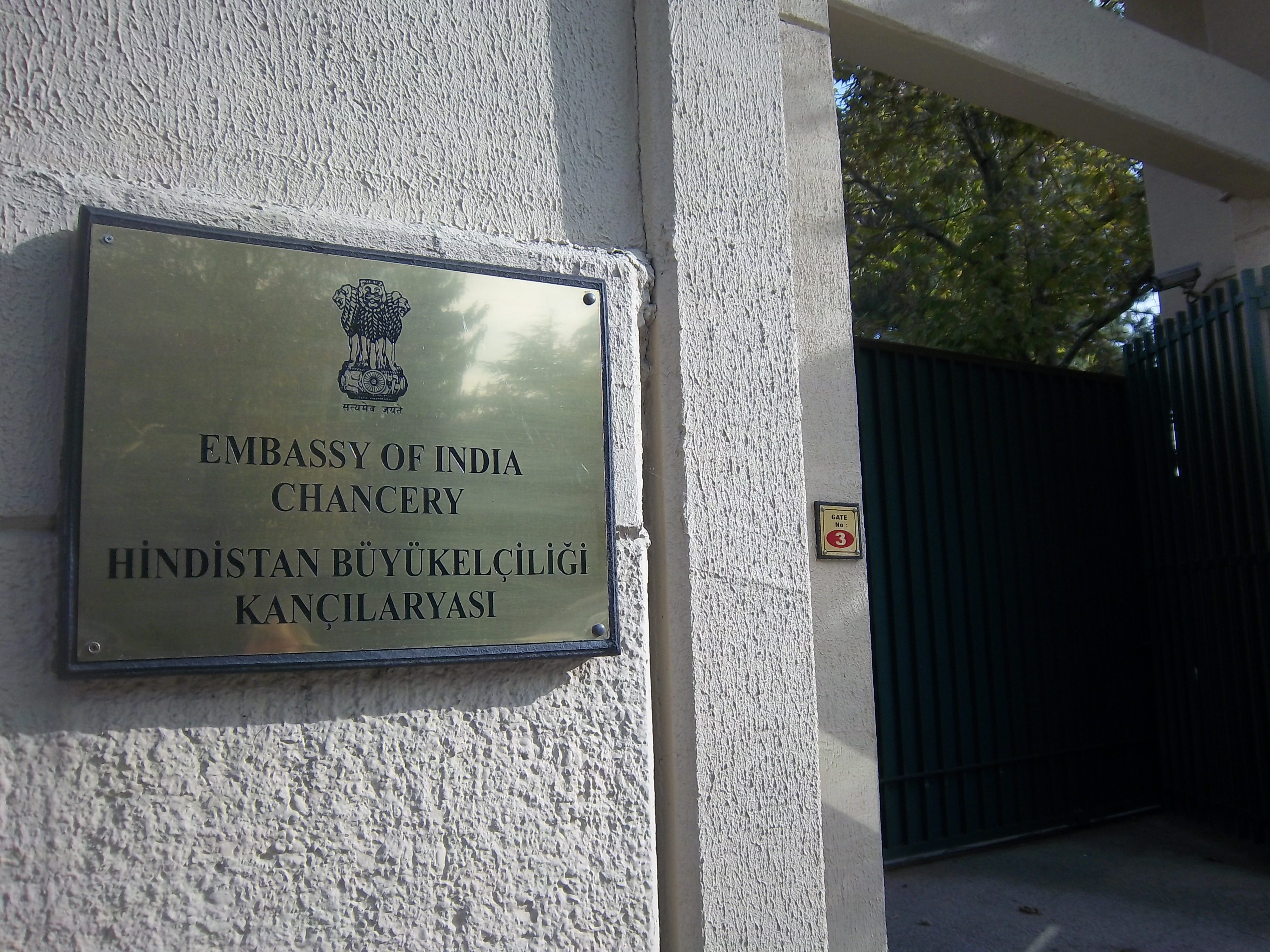 Srpskohrvatski / српскохрватски: Ploča na ulaznim vratima Ambasade Indije u Ankari.